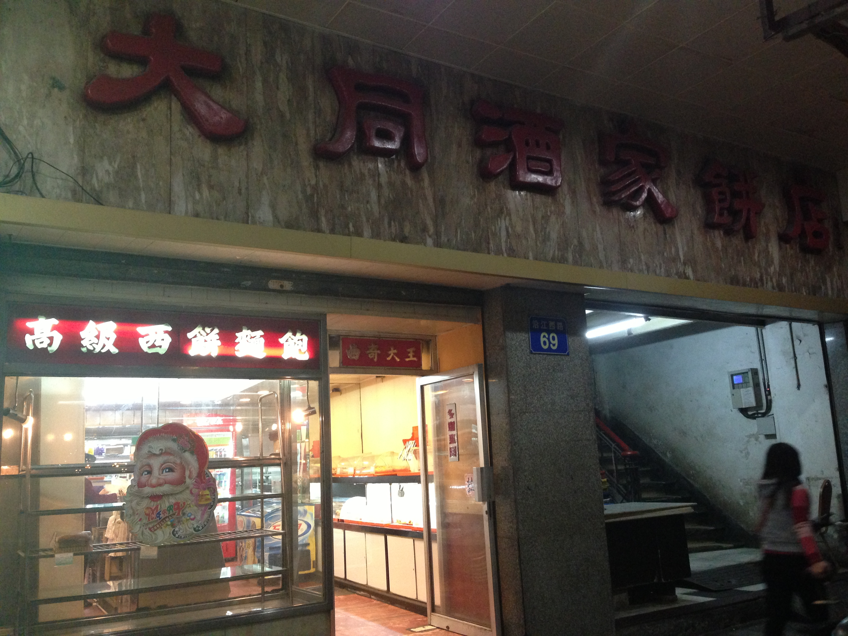 廣州市大同酒家餅店